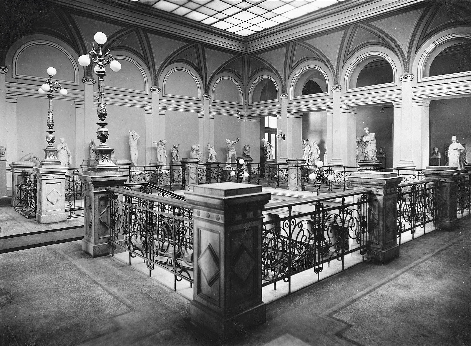 Glavno stopnišče Narodne galerije.